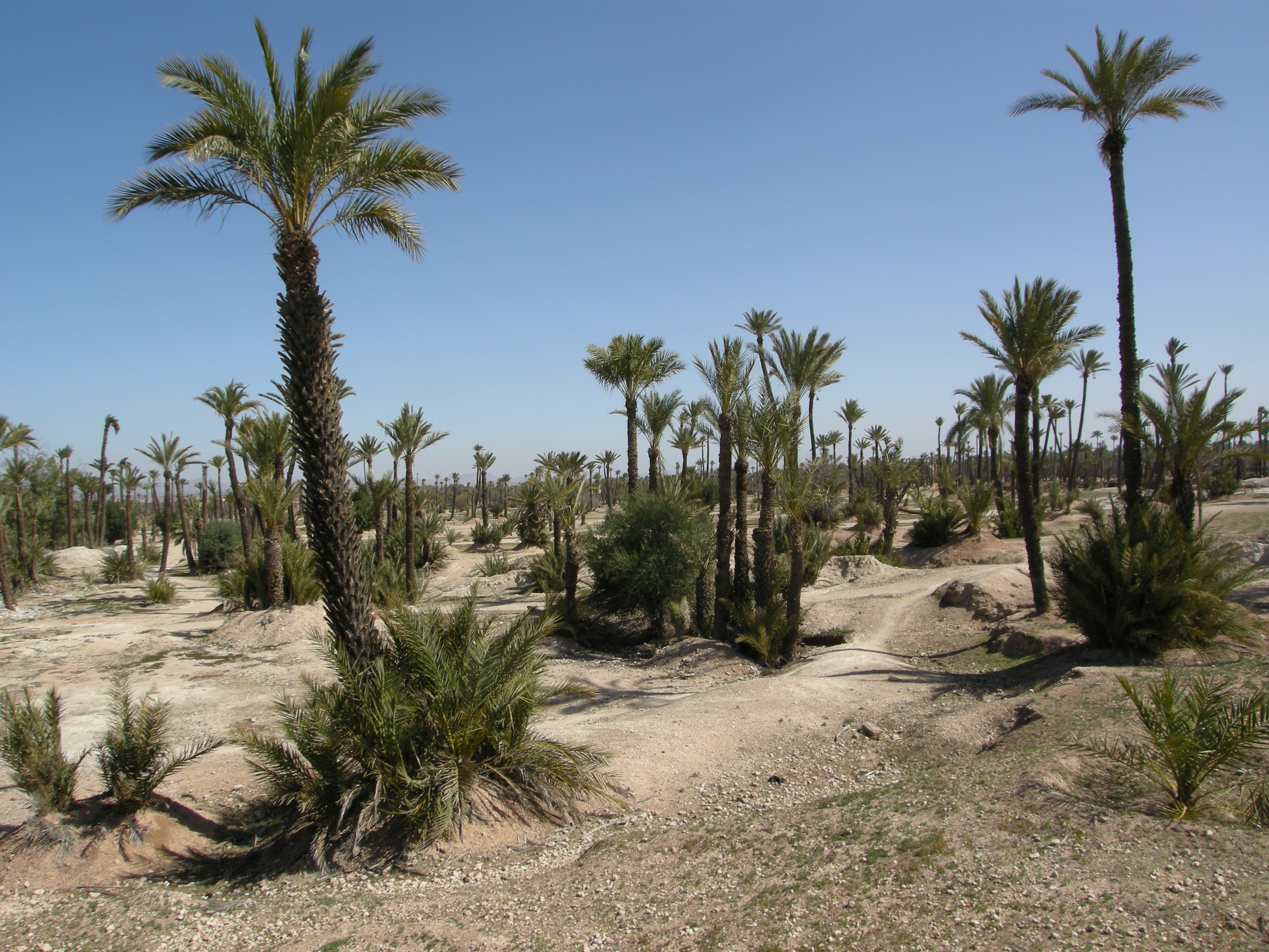 Palmeraie, Marrakech, Maroc. Février 2012